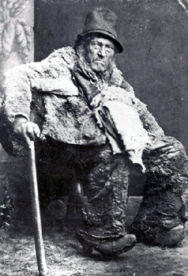 Chresten Christian Larsen (1806-1891), kendt som Tordenkalven.